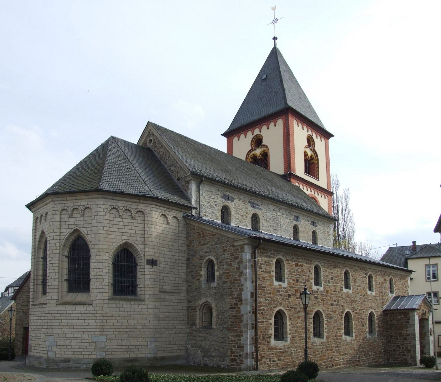 Kirche St. Severinus in Erpel